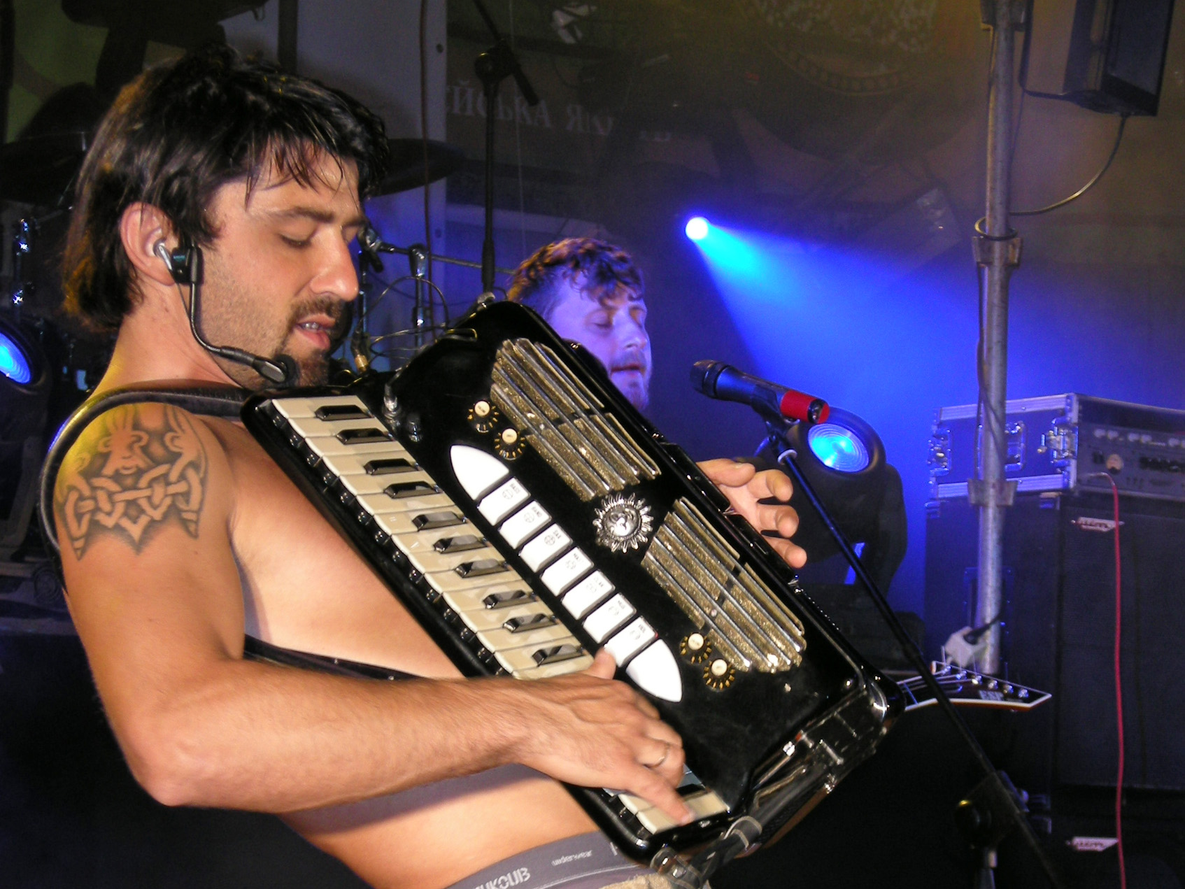 Український музикант, акордеоніст, один із лідерів фольк-рок-гурту «Kozak System» Іван Леньо під час виступу гурту «Гайдамаки» на «Співочому полі» Тернополя 26 серпня 2007 року.